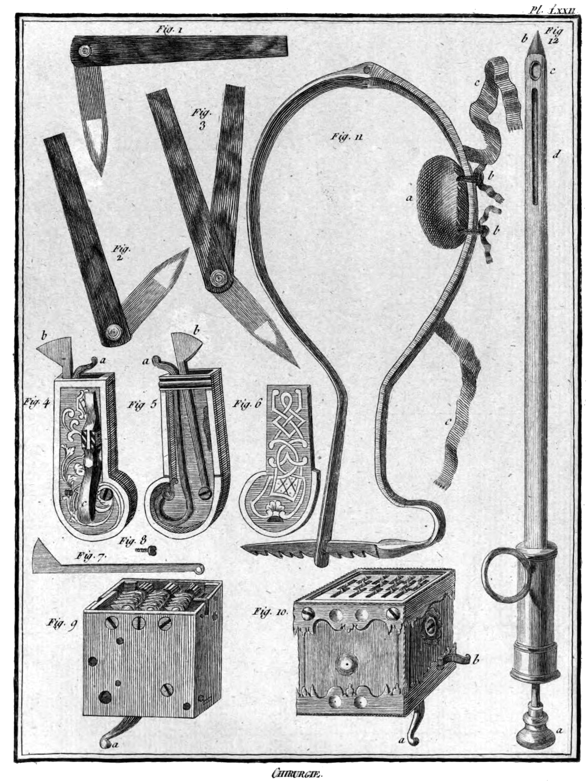 Abbildung von Aderlasswerkzeugen